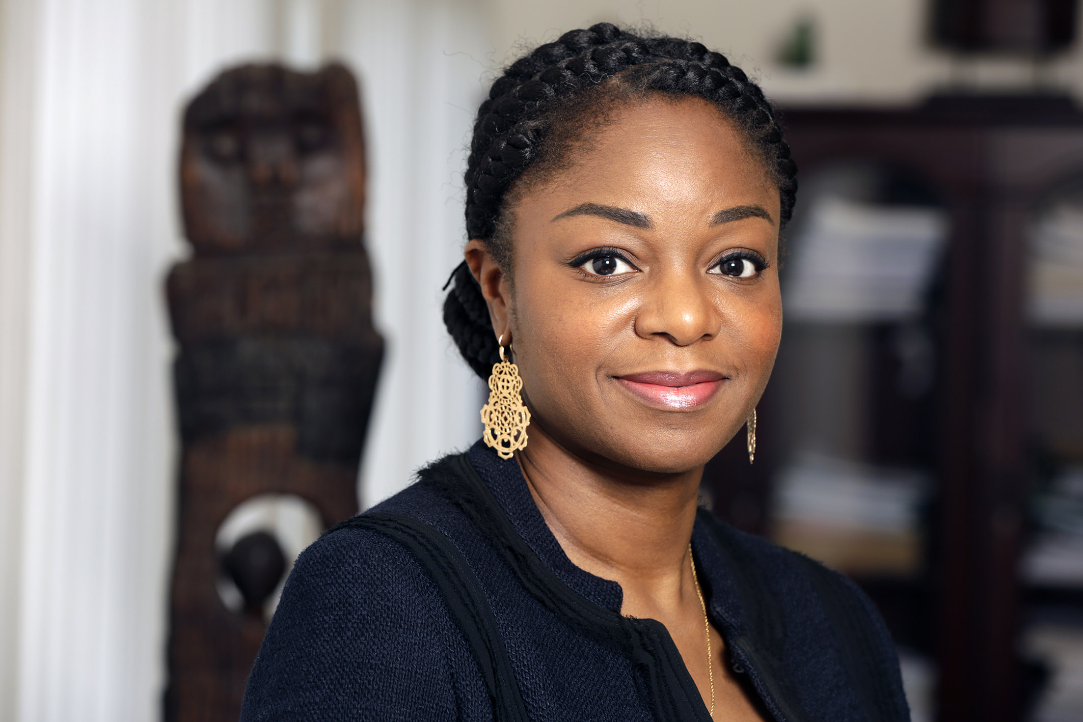 Photo officielle de la Ministre des Postes et de l'Economie Numérique du Togo - Cina Lawson